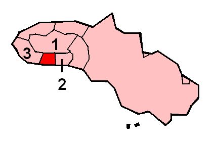 Het Wanukaka tussen de andere talen van Soemba (Oost-Nusa Tenggara, Indonesië). Eigen werk, vrij voor het publiek.